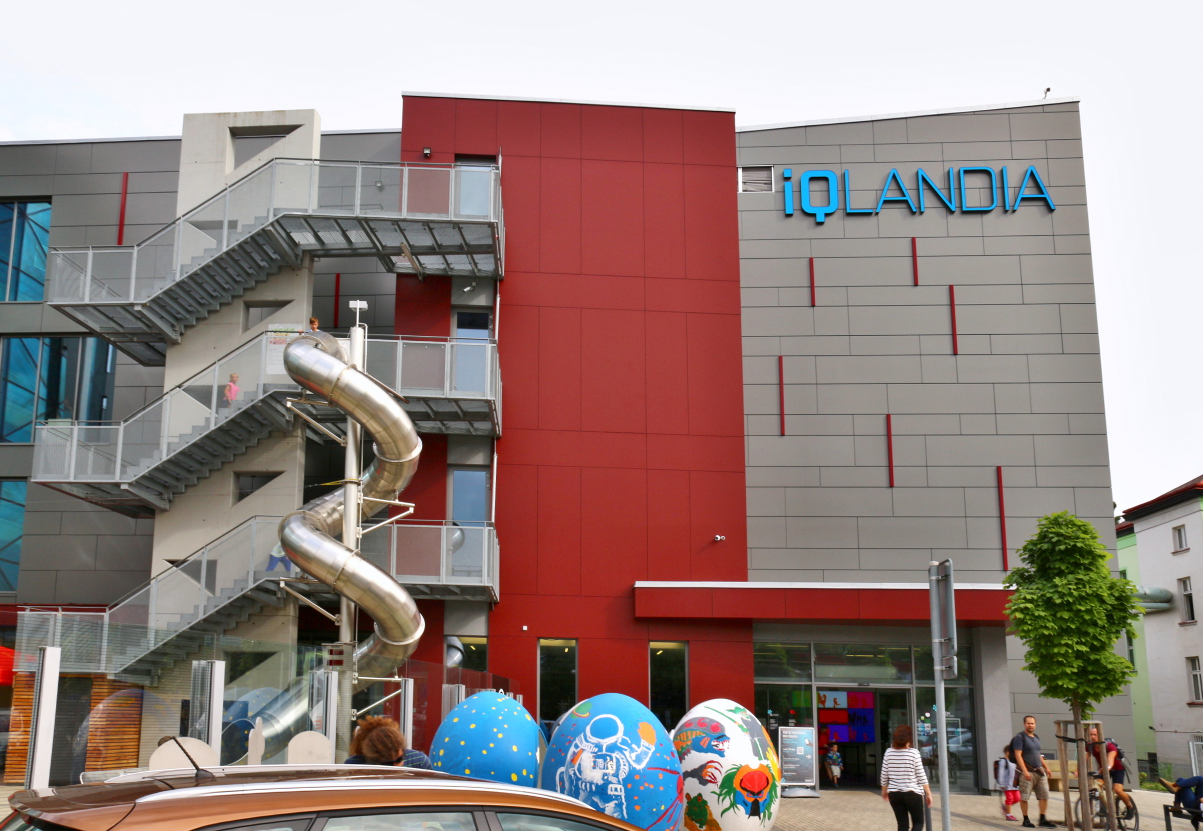 Liberec, IQlandia